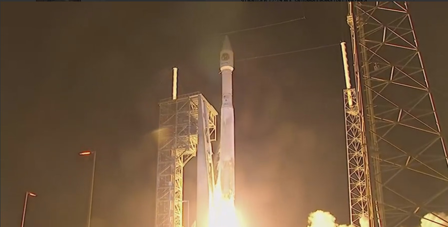 Отрыв.